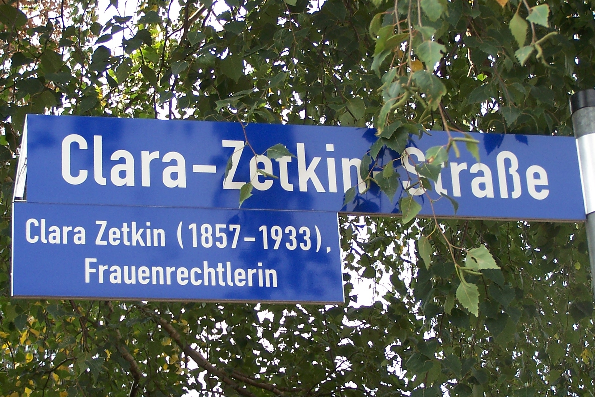 Straßenschild und ERläuterungstafel zur Clara-Zetkin-Straße in Eisenach.